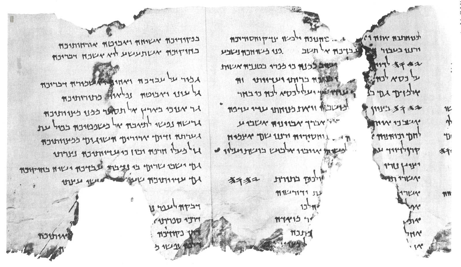 死海文書を名乗っているものの一部